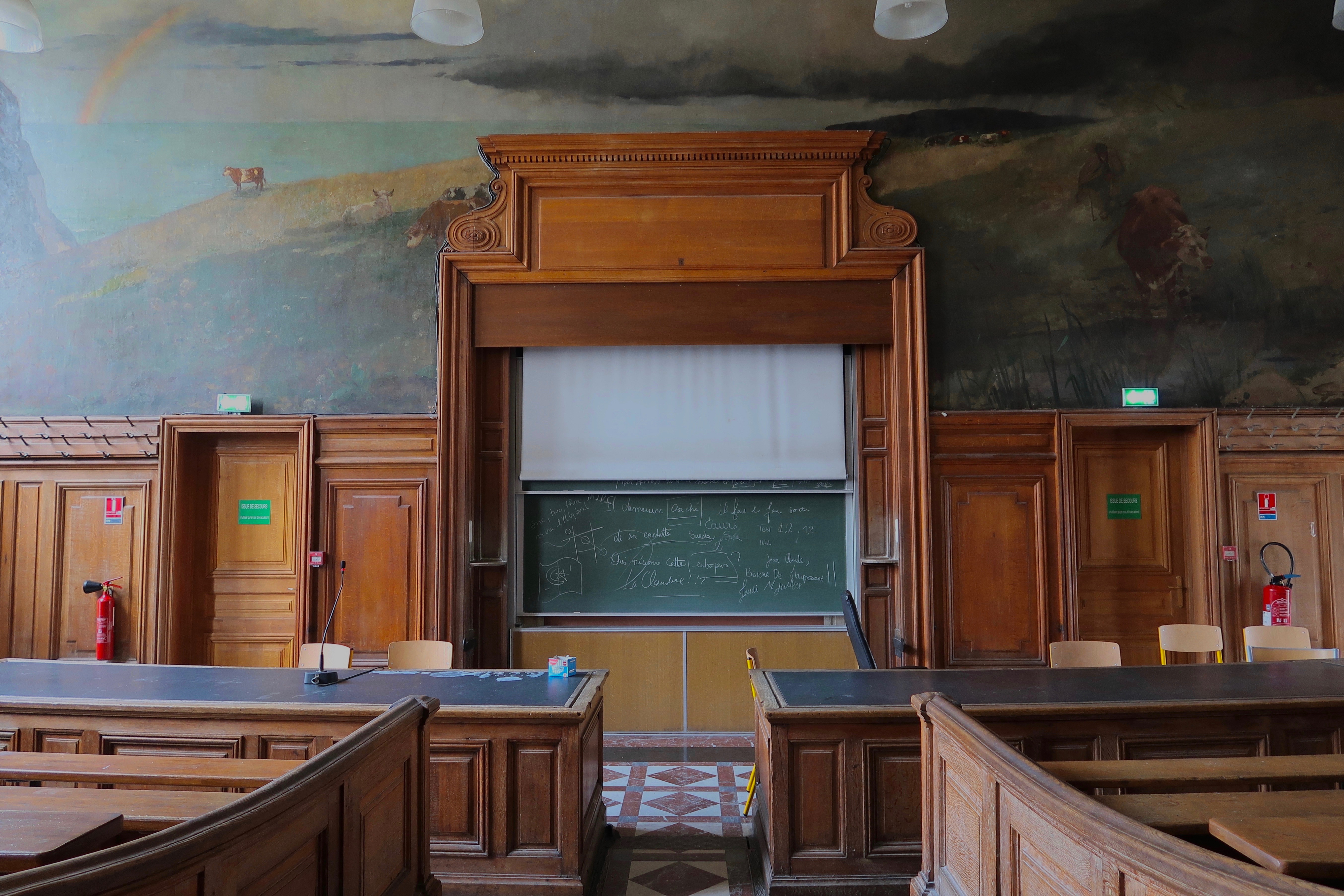 Amphithéâtre Lefebvre, La Sorbonne (Paris, 5e).